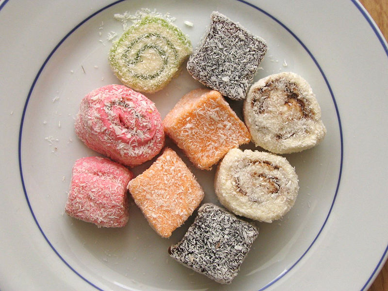 شیرینی راحت الحلقوم